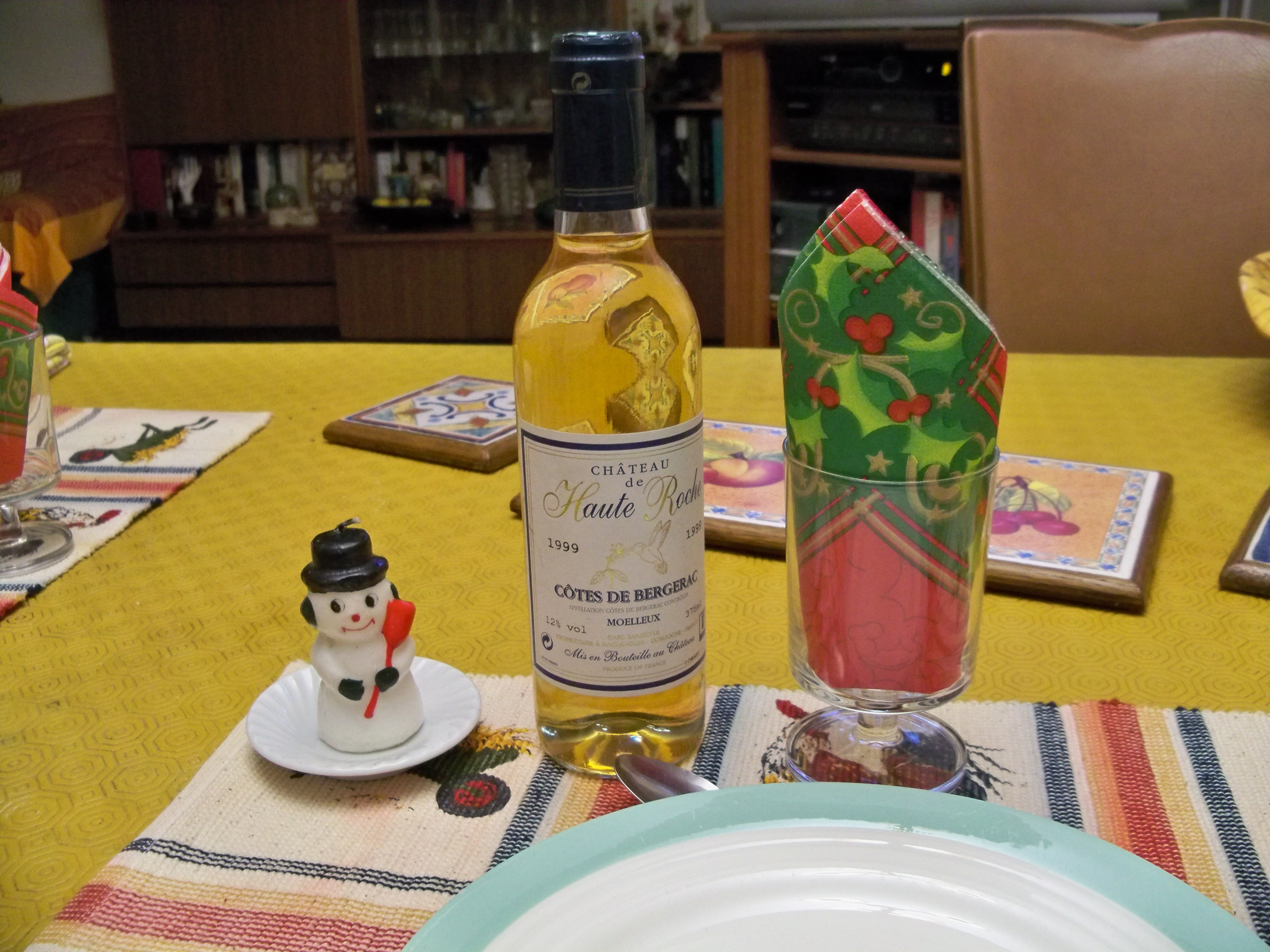 bouteille de haute Roche, Bergerac blanc